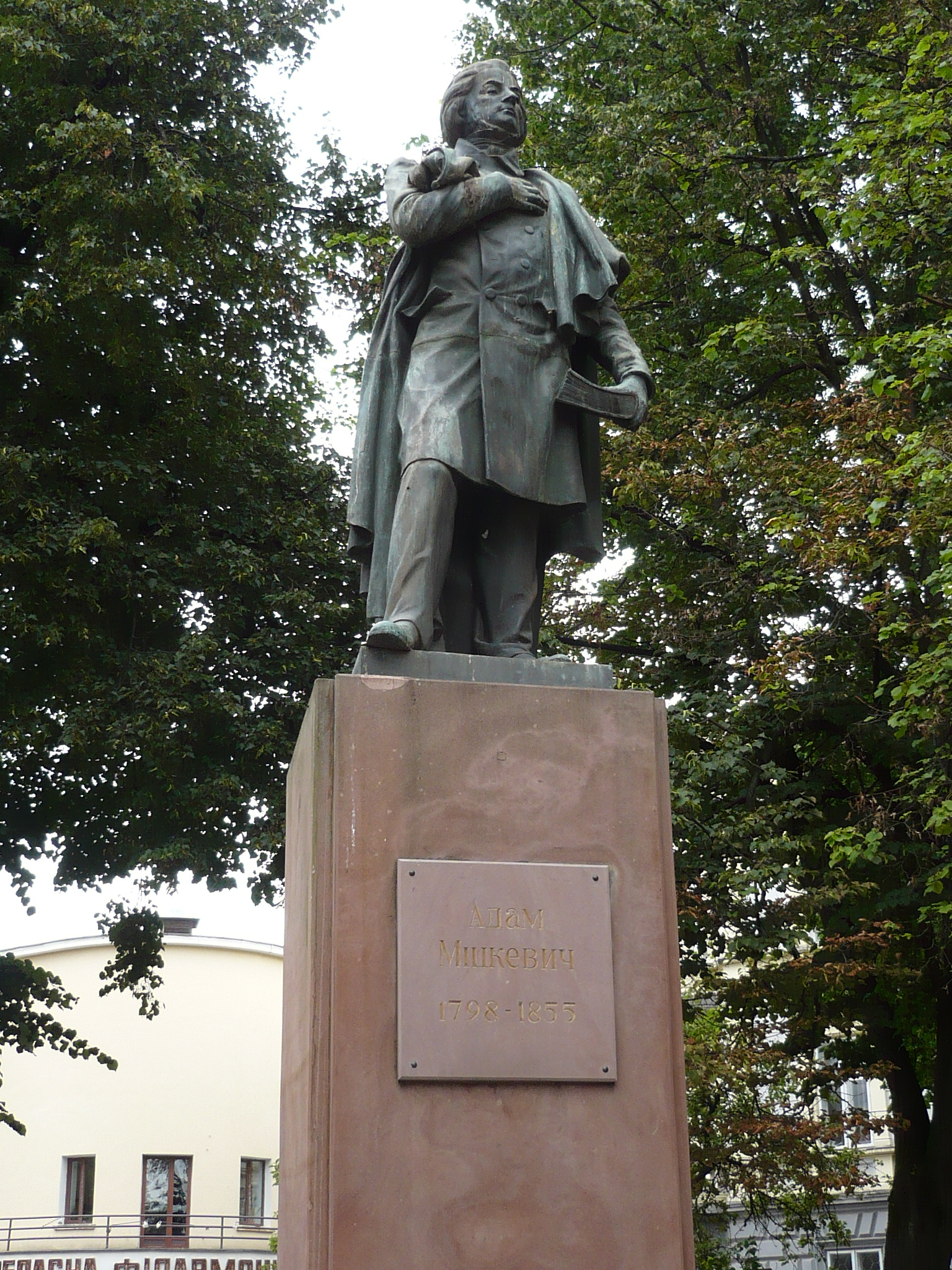 Pomnik Mickiewicza Iwano-Frankiwsku